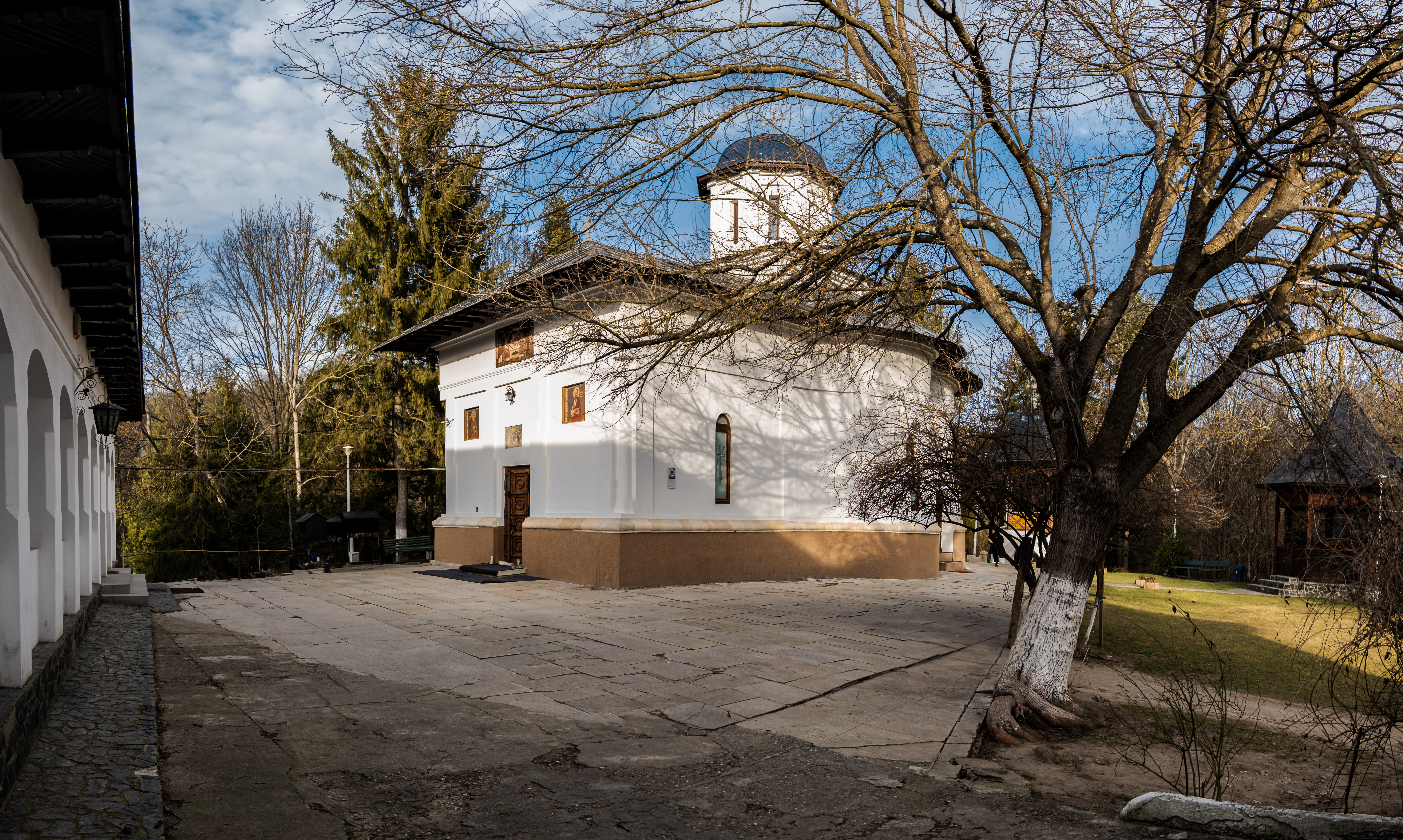 Mânăstirea Trivale 2020